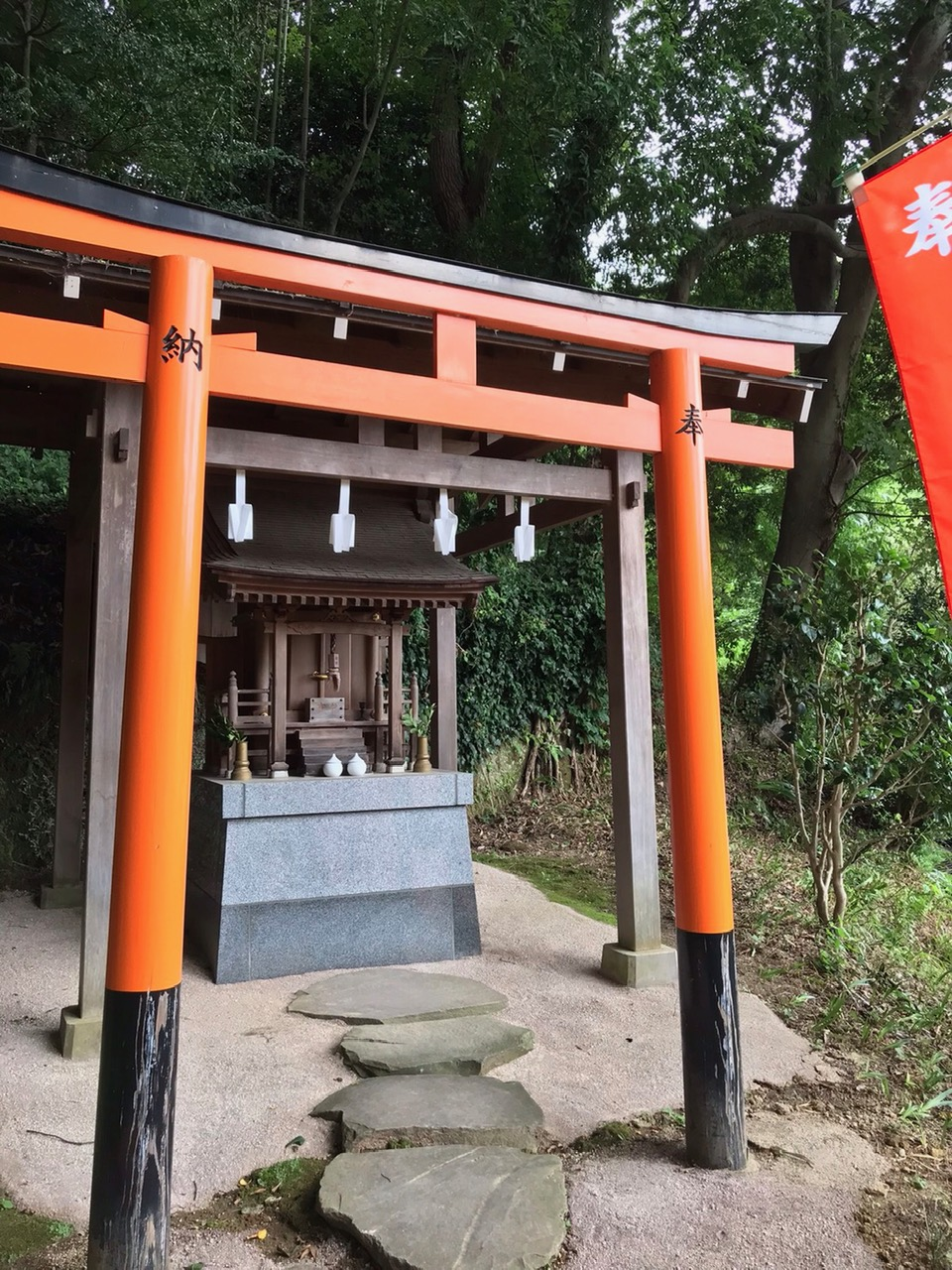 妙圓寺稲荷社